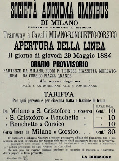 Locandina tram Milano-Corsico